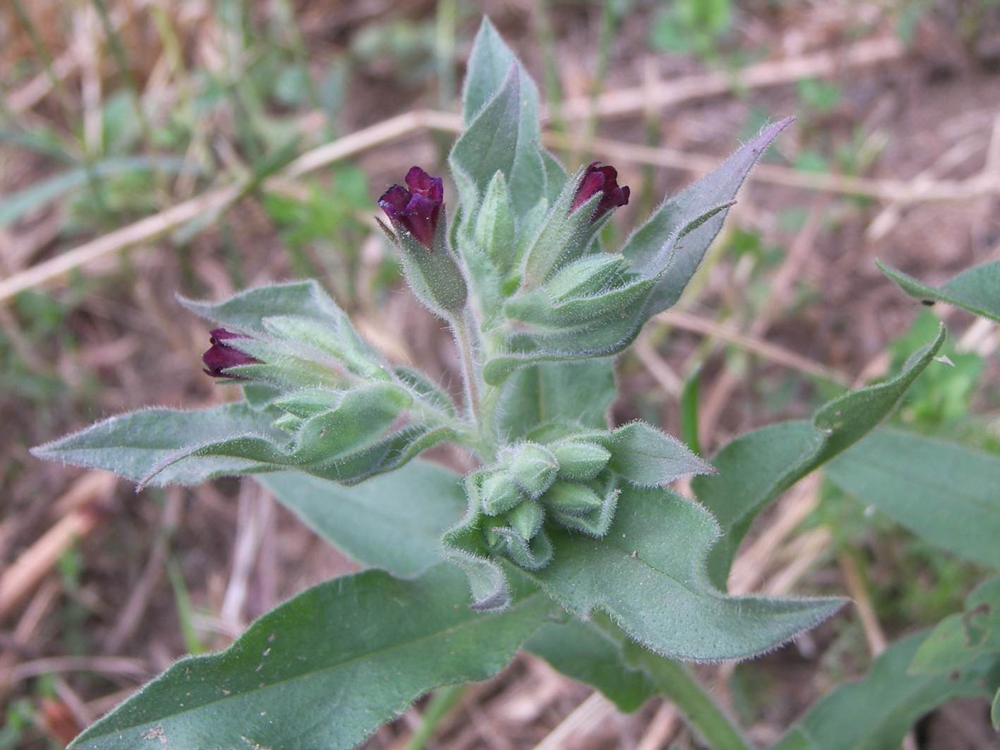 Brno-Komín,Nonea pulla, Pipla osmahlá, Pastviny, ČR, EU,29.6.2004. Jedno z mála míst v Brně , kde rostla, na lokalitě už třetím rokem pipla osmahlá chybí, druhová pestrost byla zničena pravidelným pokosem. Dříve na tomto místě, na ulici Absolonova pipla tvořila bohaté porosty.